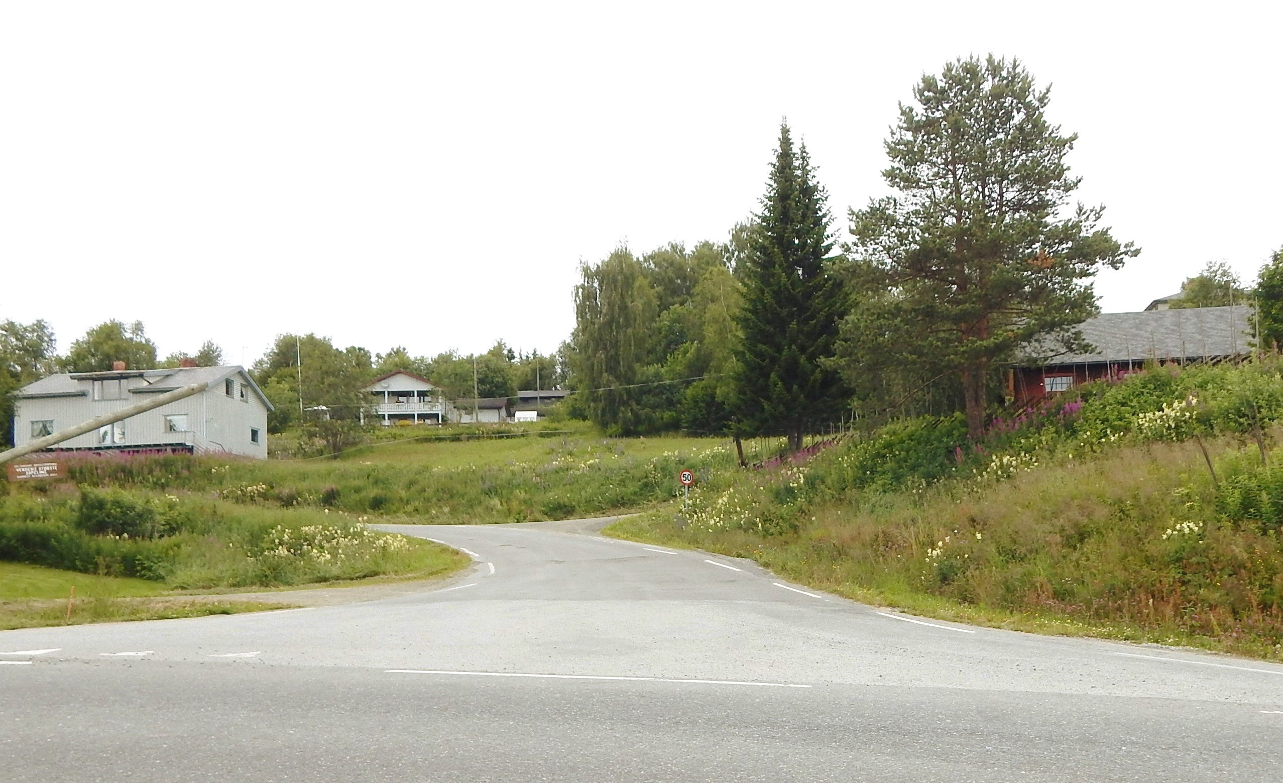 Sælshagan går opp fra E16 og fortsetter som Robølevegen.